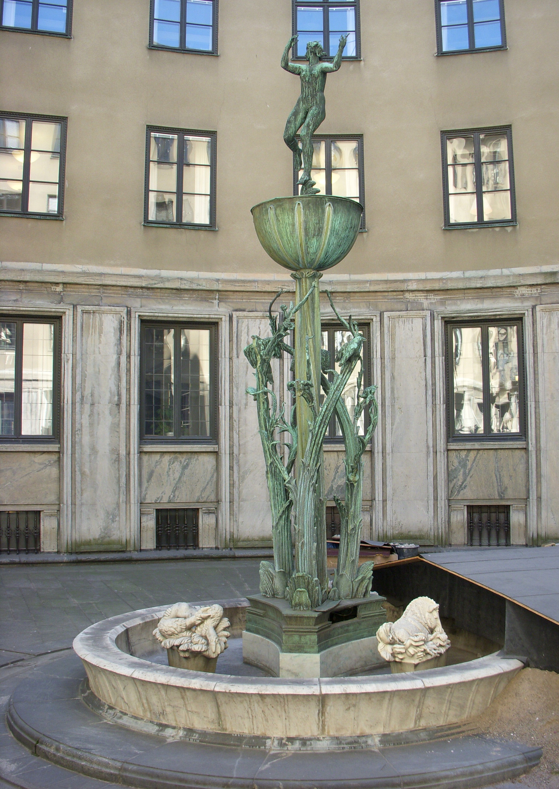 "Diana" Carl Milles i Tändstickspalatset i Stockholm